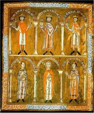 Ewangeliarz emmermaski, strona 4